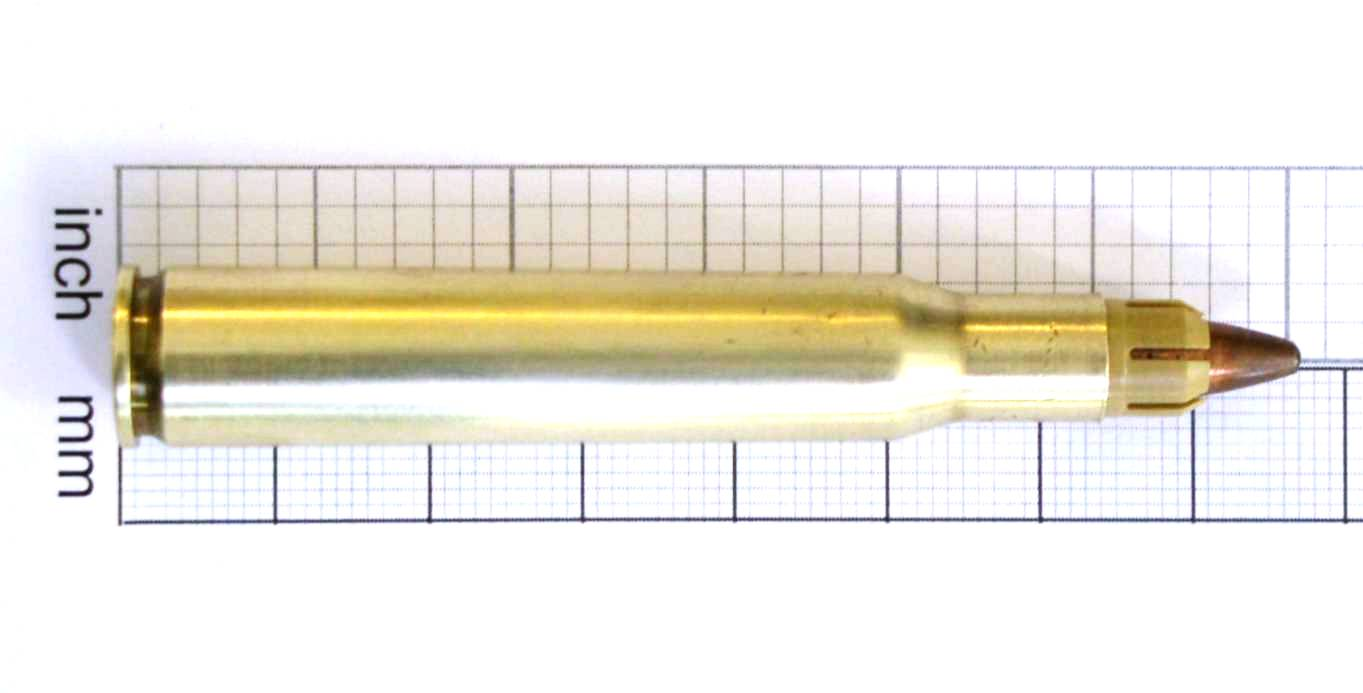 Patrone .30/06-SABOT